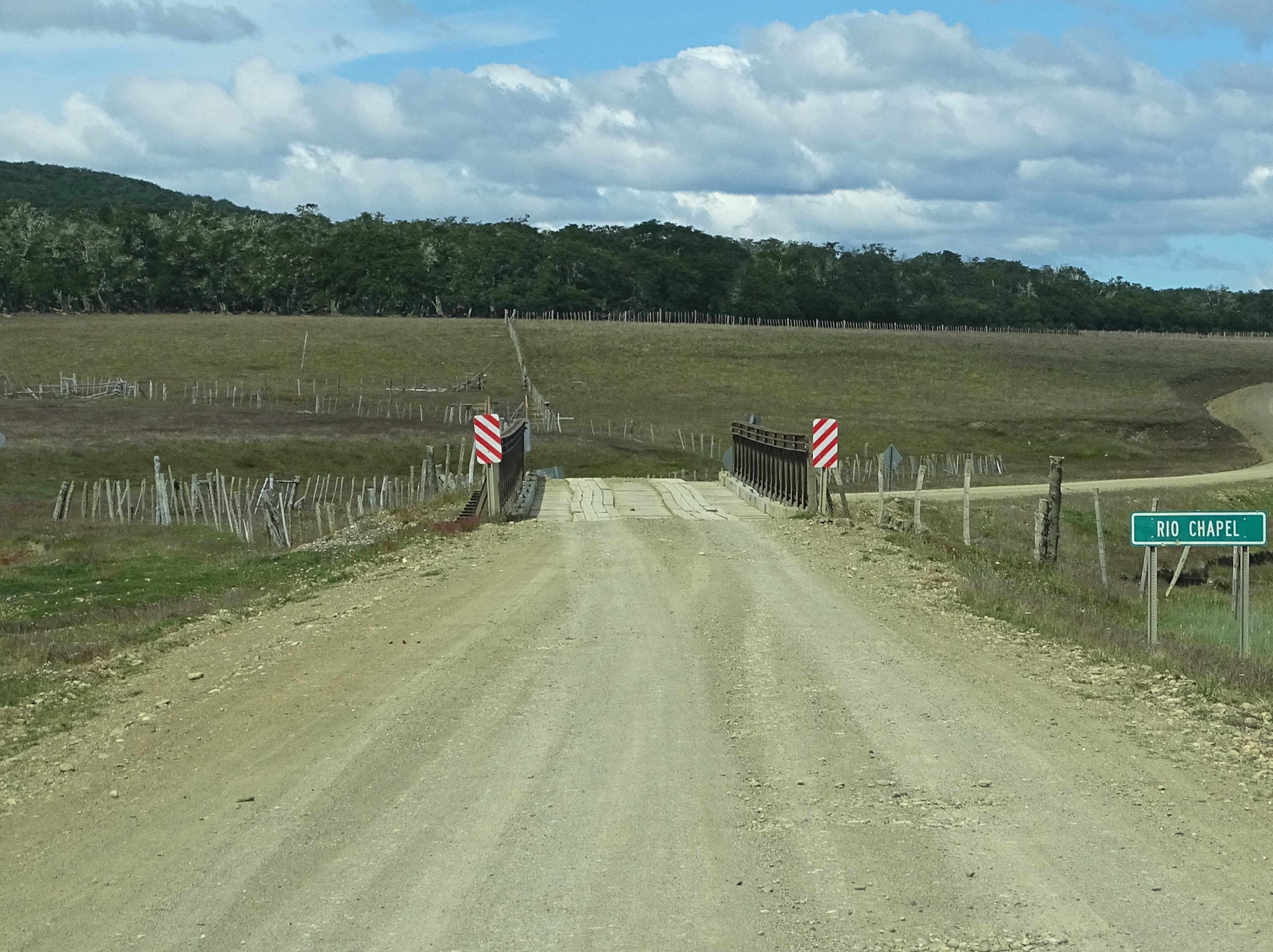 Provincia de Tierra del Fuego, ruta provincial "A", cruce sobre el Río Chapel.